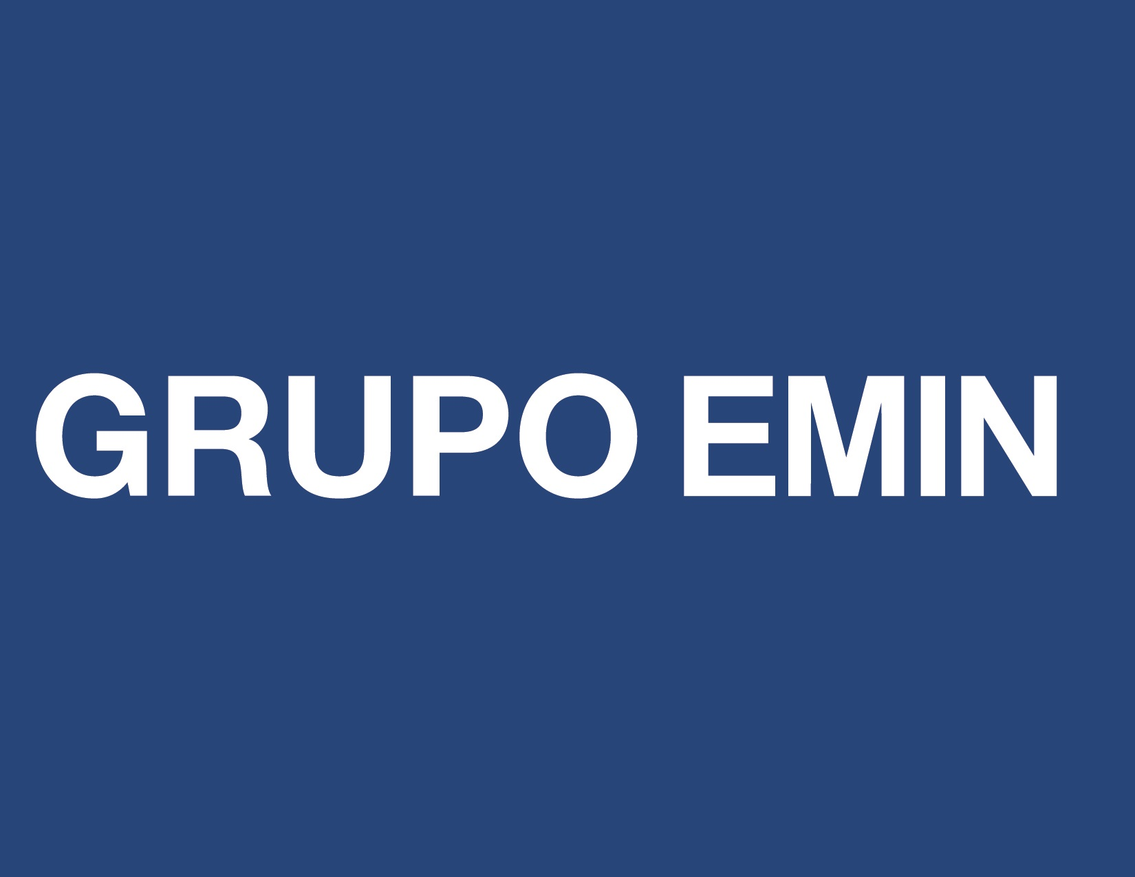 Grupo EMIN logo simple